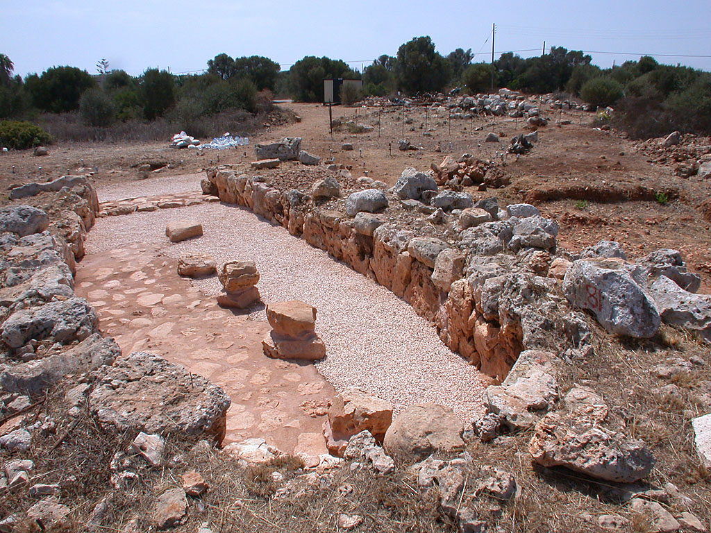 Habitación naviforme del poblado de "Es Closos de can Gaià", perteneciente al Bronce Antiguo de Mallorca.